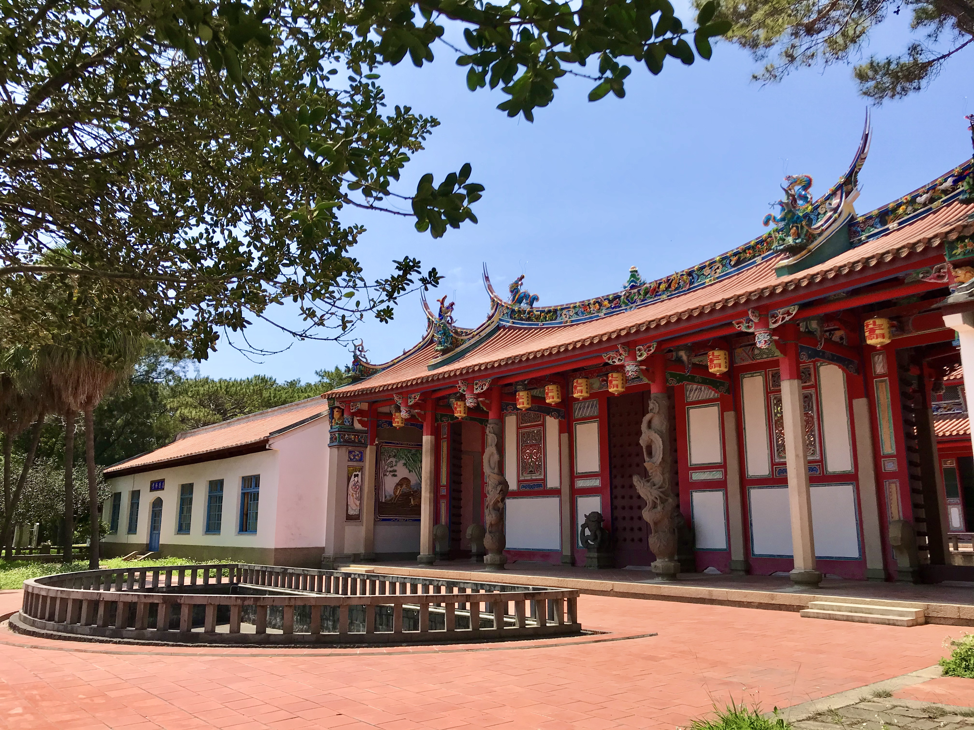 中文（台灣）: 新竹孔子廟大成門與泮池